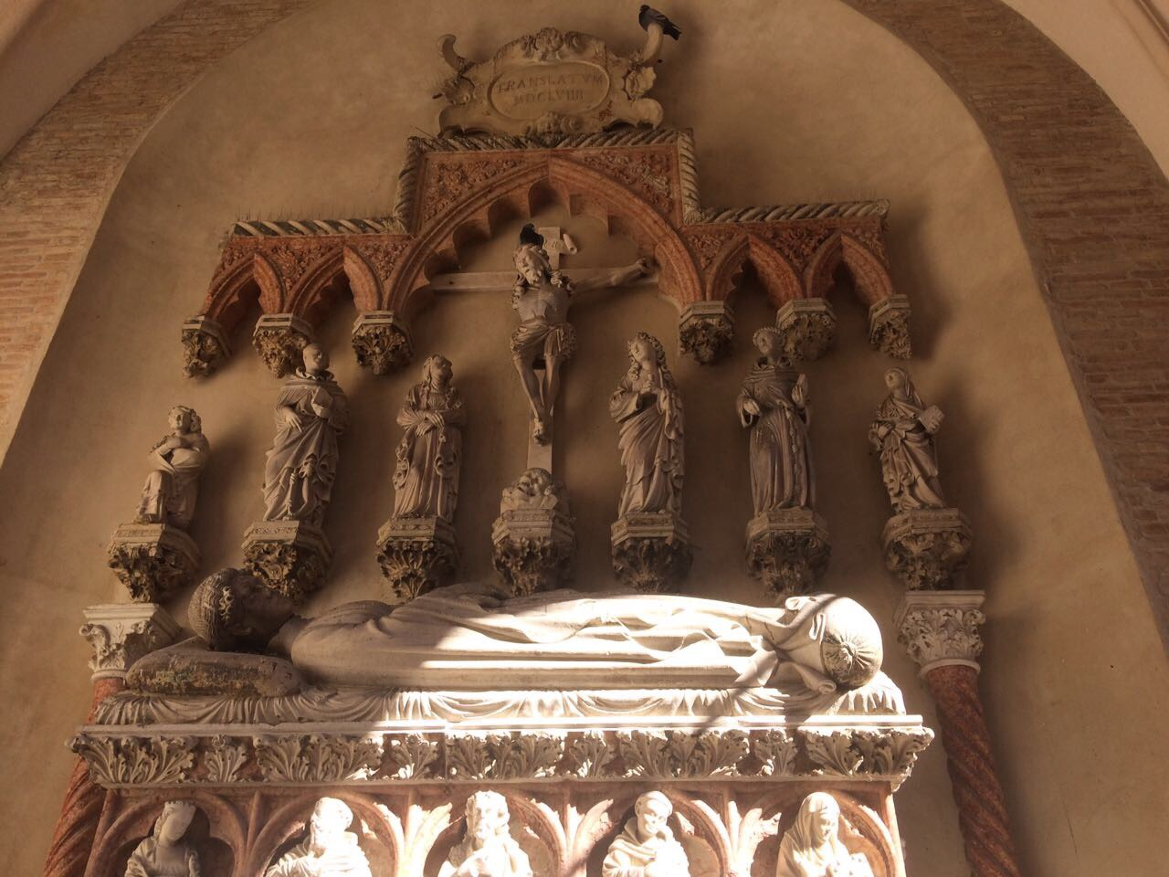 Tomba di Paola Bianca Malatesta collocata nella parete sinistra dell'esterno della chiesa di San Francesco a Fano